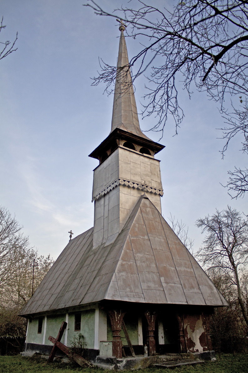 Biserica de lemn "Sf. Arhangheli" (1845, Ortodox român) din Cuciulat, judeţul Sălaj.